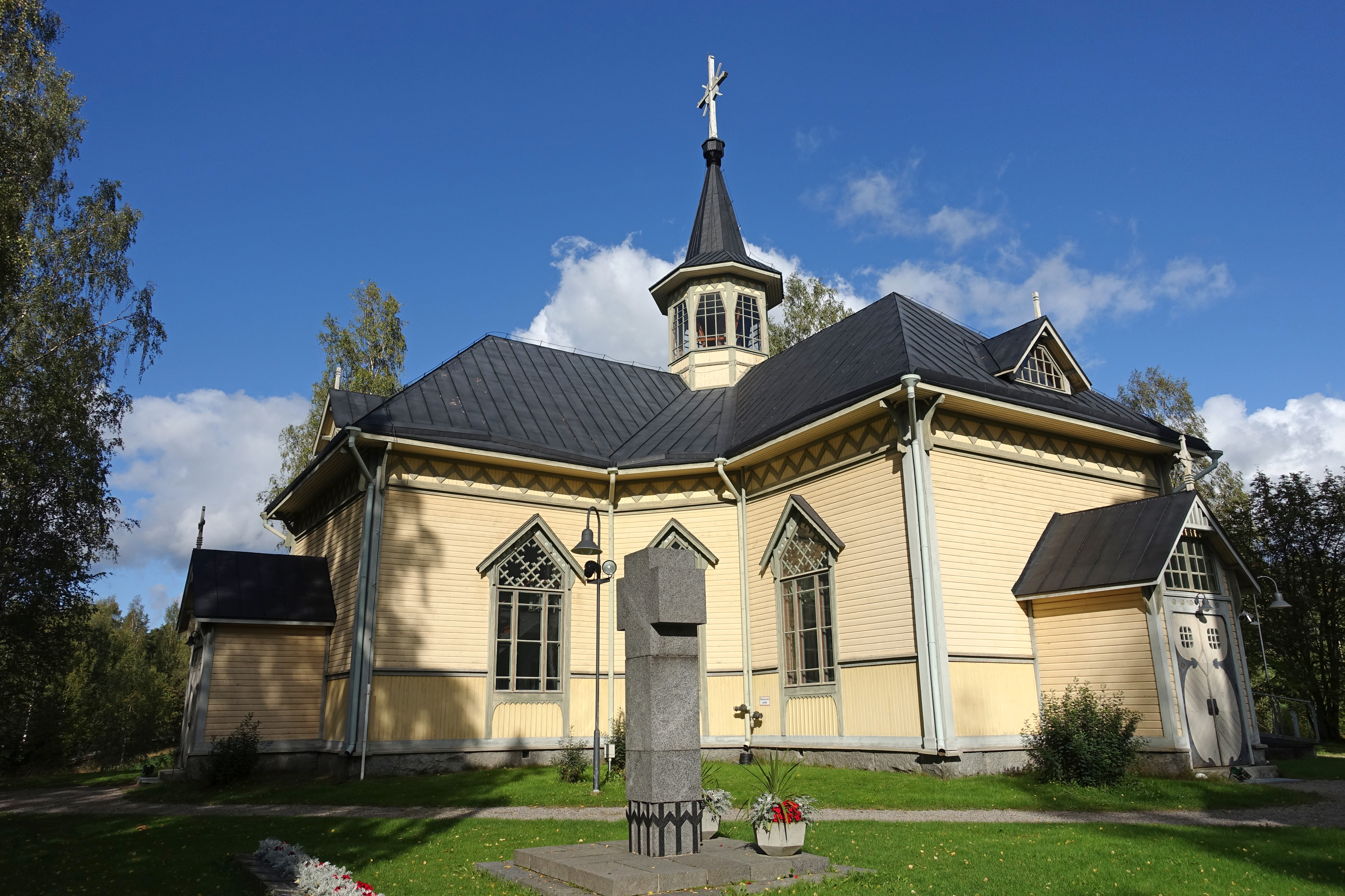 Uuraisten kirkko